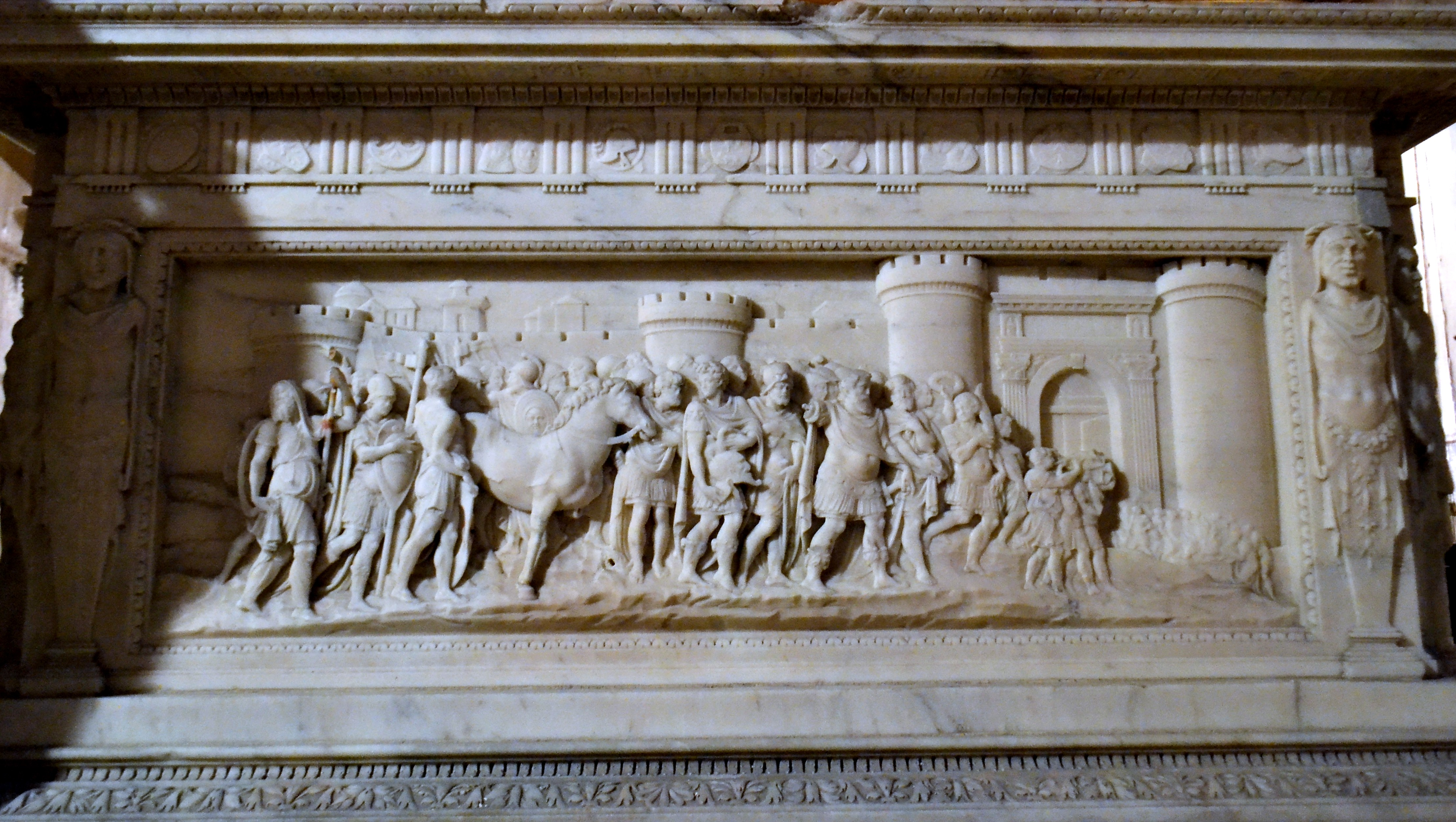 Giovanni da Nola, sepolcro di Don Pedro di Toledo. Napoli, Chiesa di San Giacomo degli Spagnoli. (particolare)